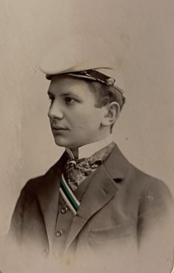 Porträtfotografie von Willy Kramer als Corpsstudent in Heidelberg